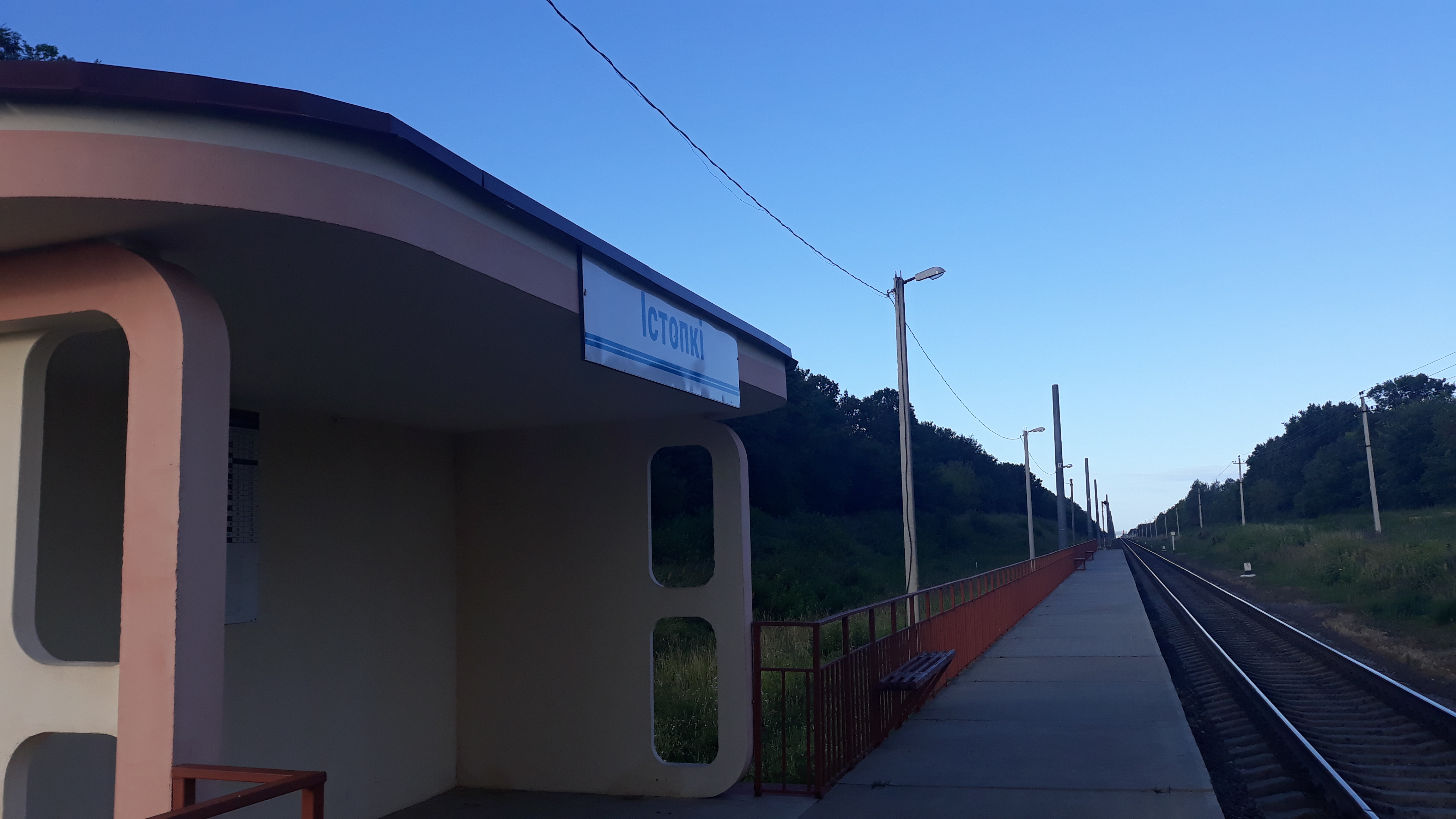 прыпыначны пункт Істопкі